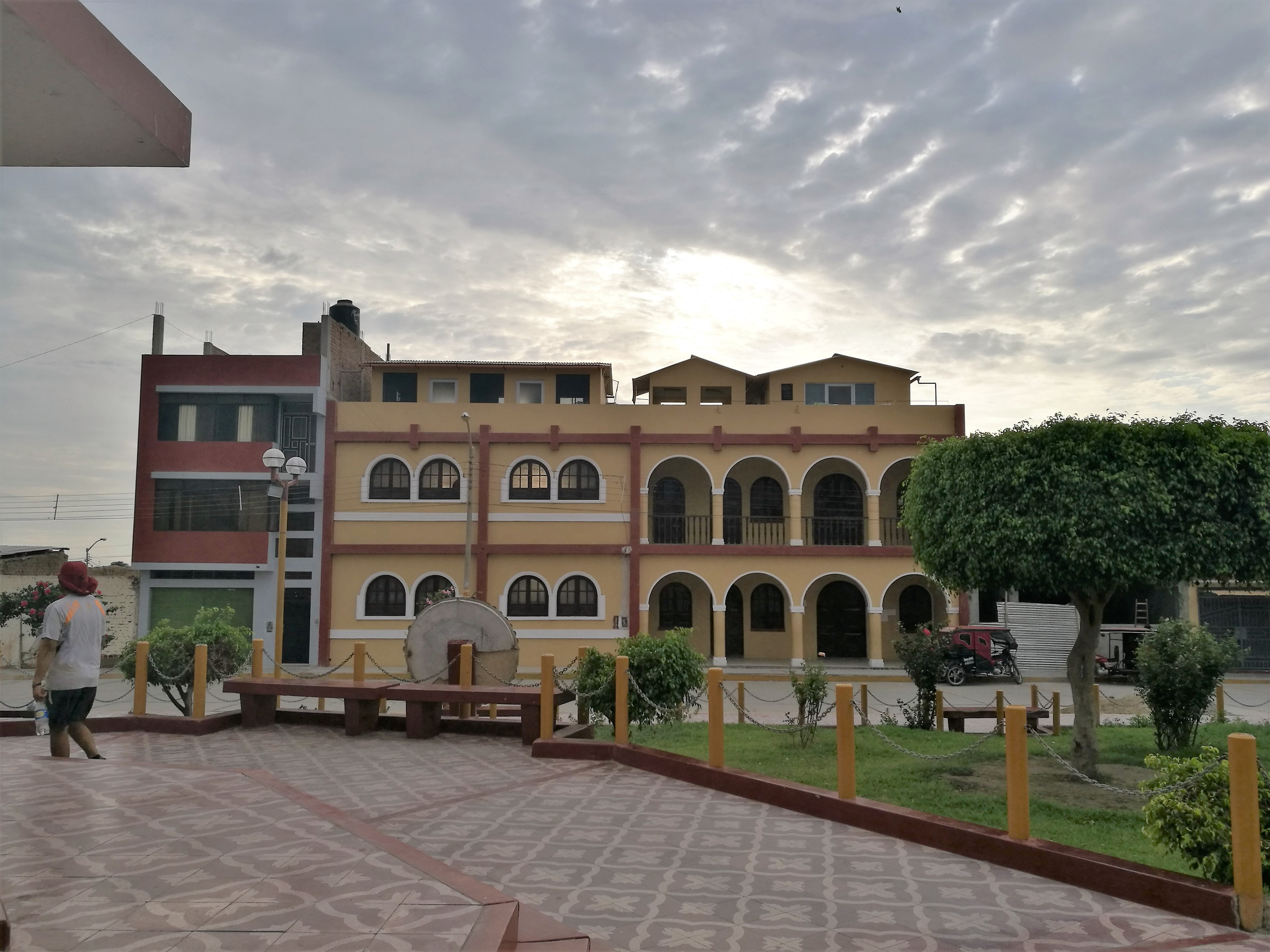 Edificis de la Plaza de Armas de Zaña